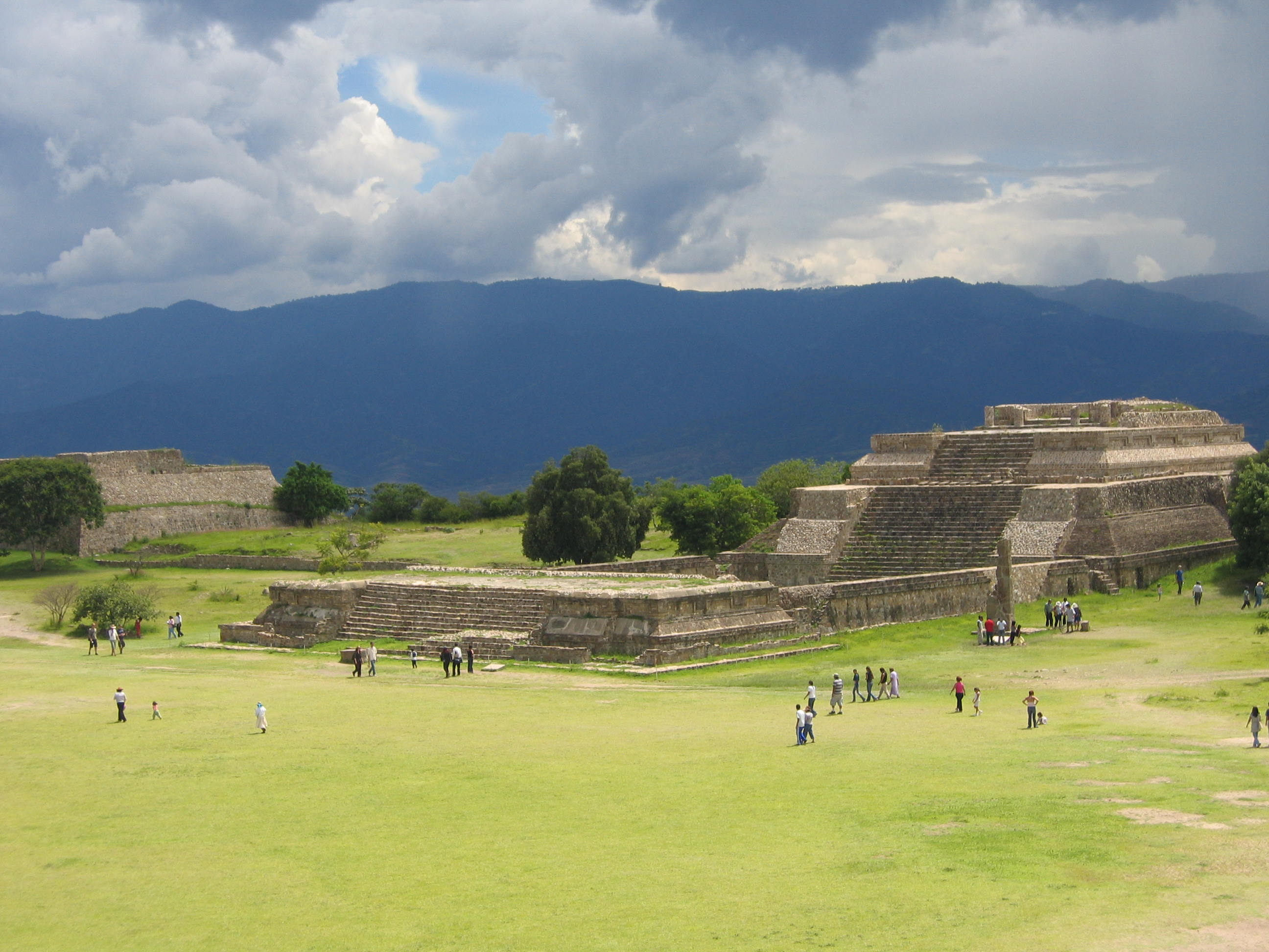 Monte Alban (Oaxaca Mexico), temple, August 2006